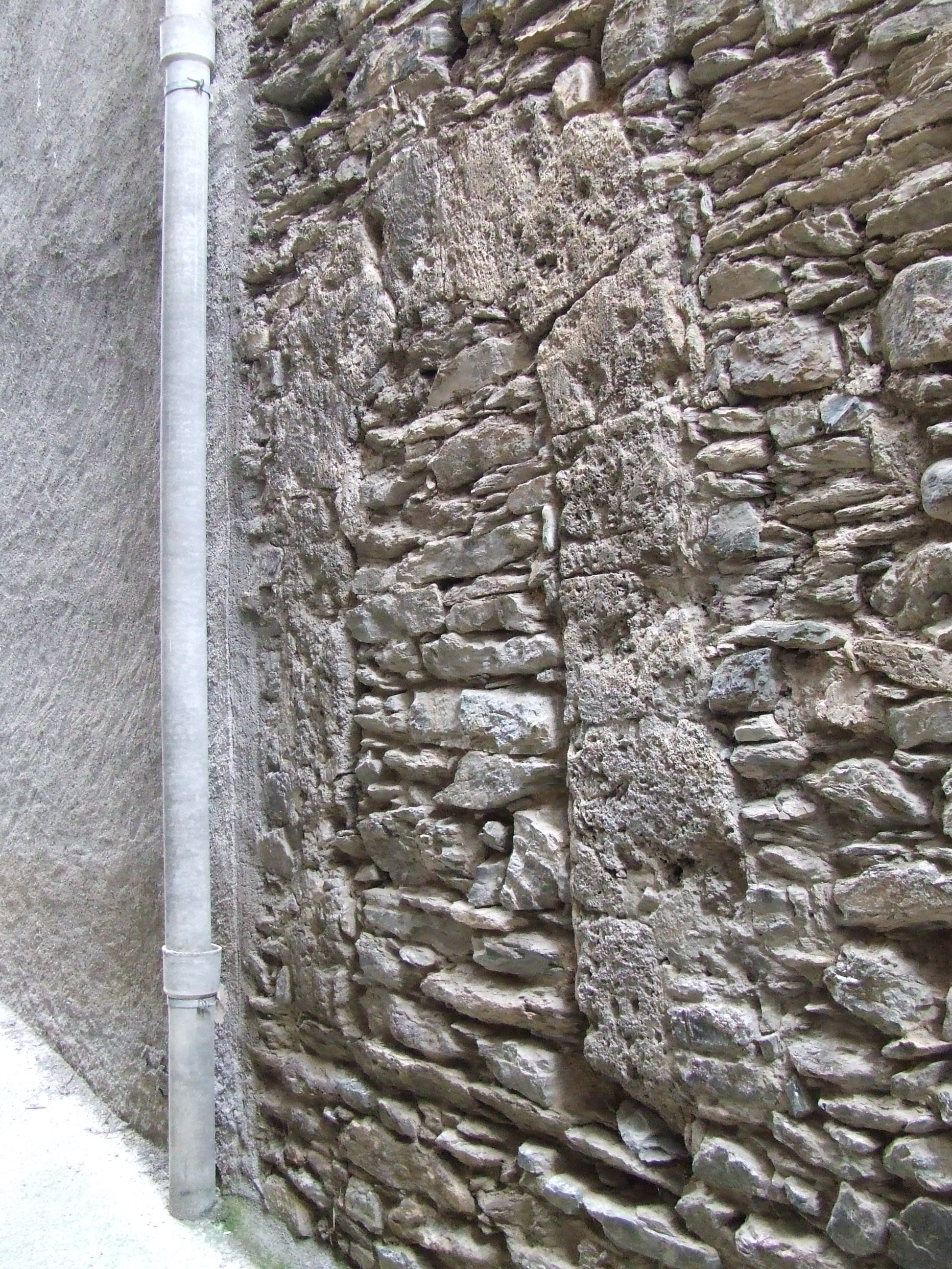 Porta medieval a Mont-ros (la Torre de Cabdella, Pallars Jussà)